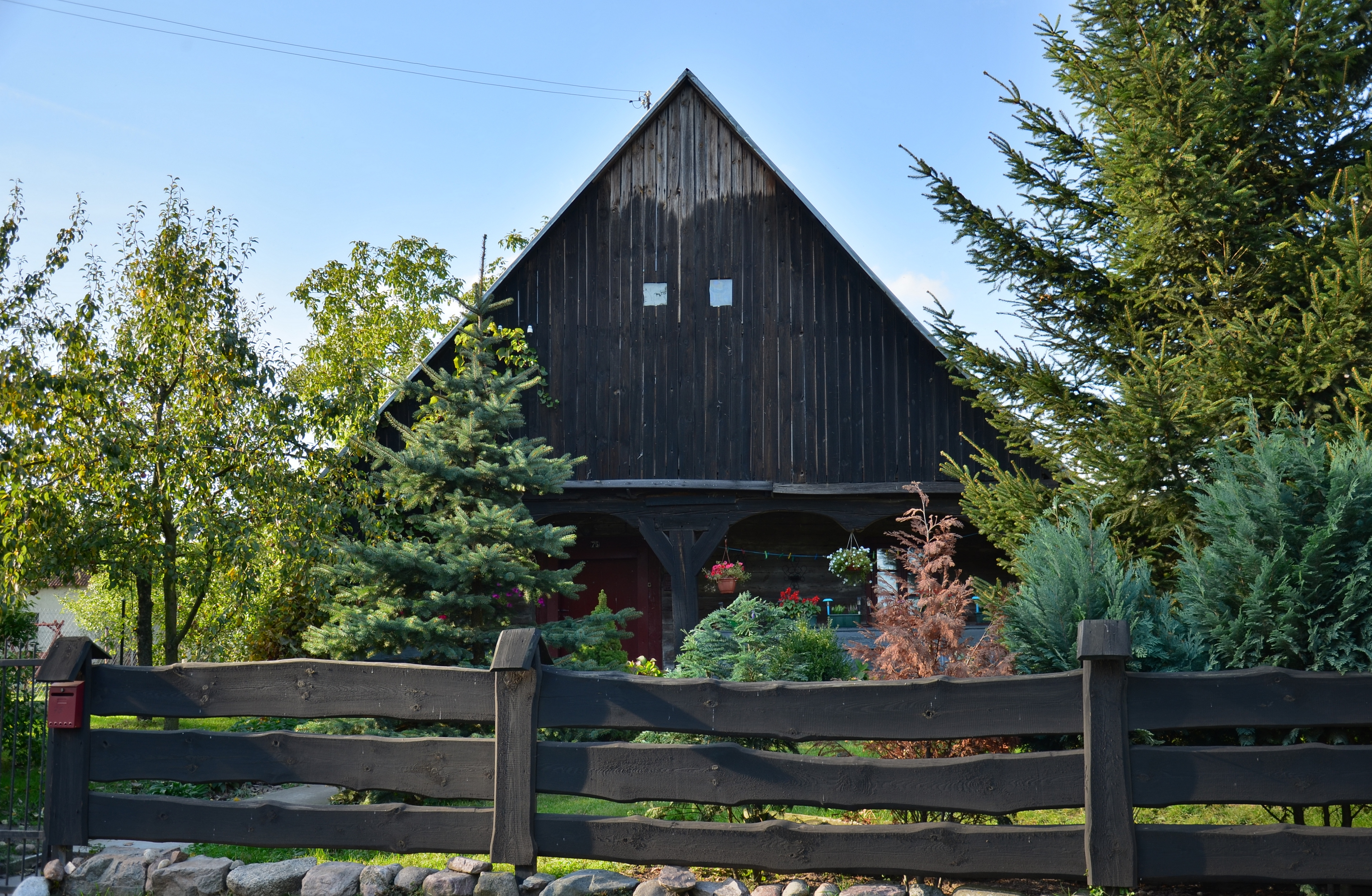 Szczuka, chata podcieniowa nr 75, drewn., ok. 1780